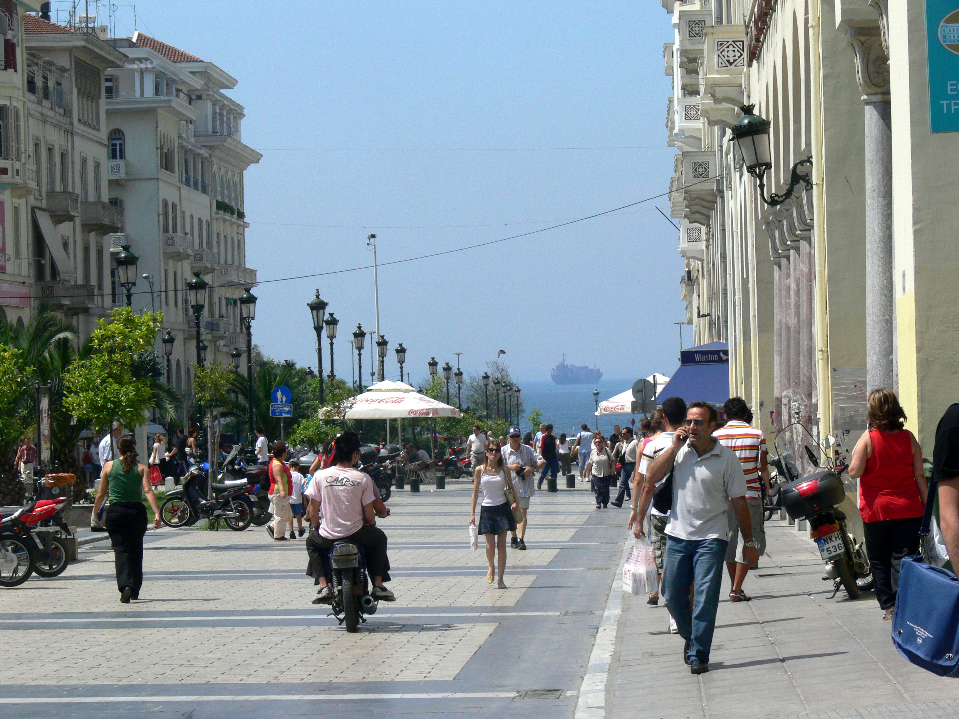 Tessaloniki. Aristoteles Str.